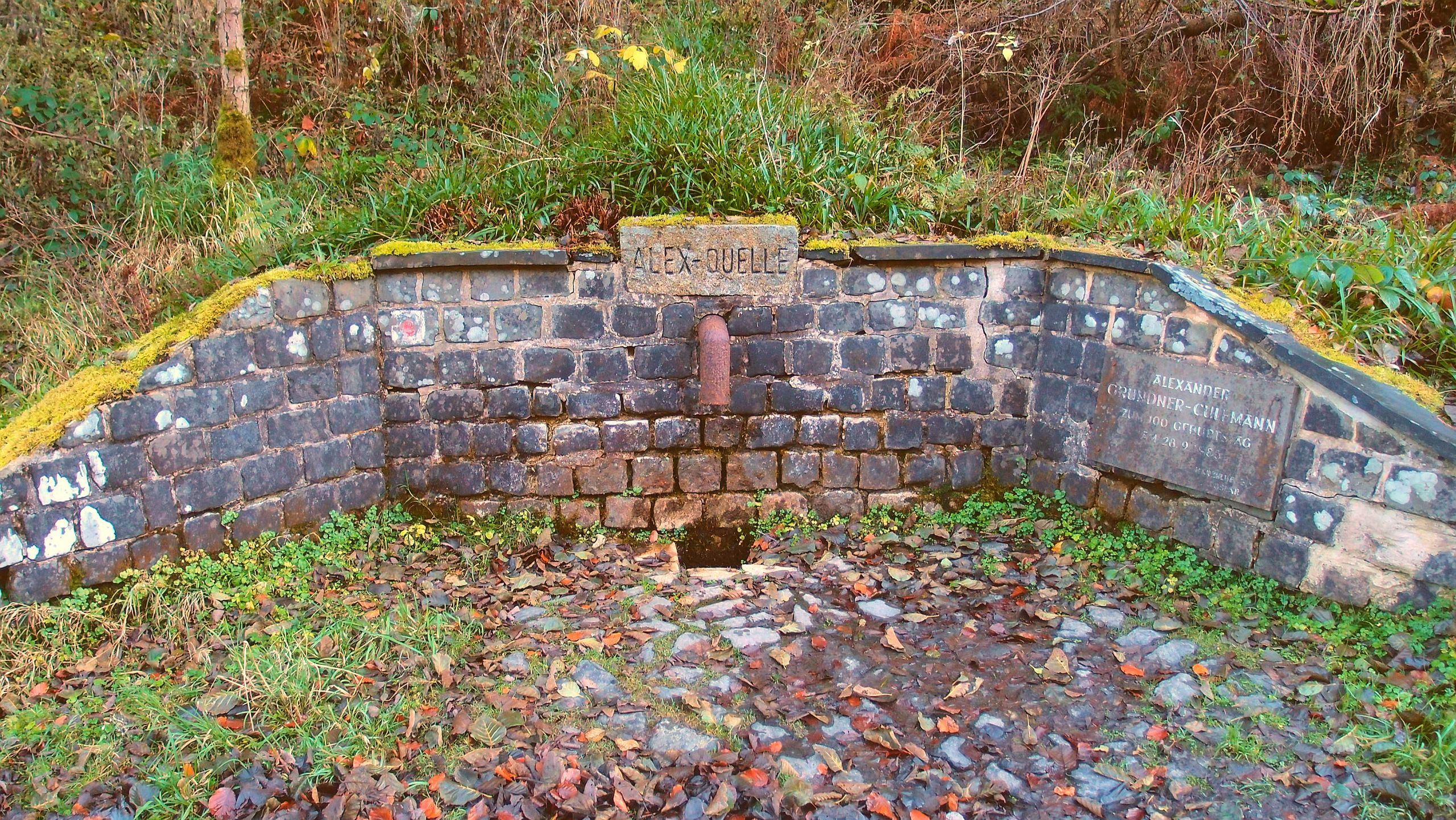 Die Alex-Quelle an Granetalstraße zwischen Hahnenklee und Goslar, benannt nach Alexander Grundner-Culemann, Stadtforstmeister und Bürgermeister in Goslar